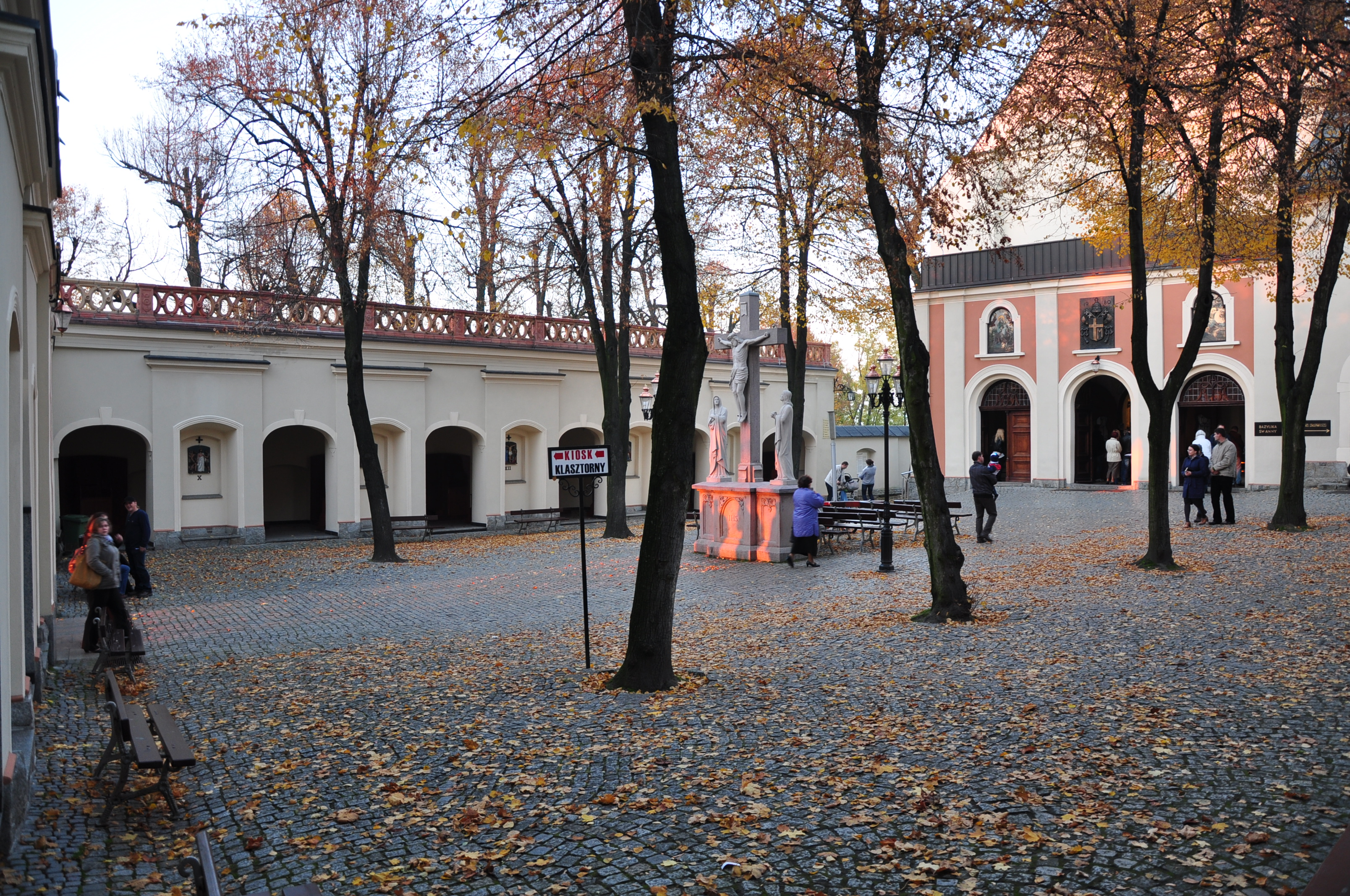 Góra Świętej Anny, dziedziniec krużgankowy, XVIII/XIX